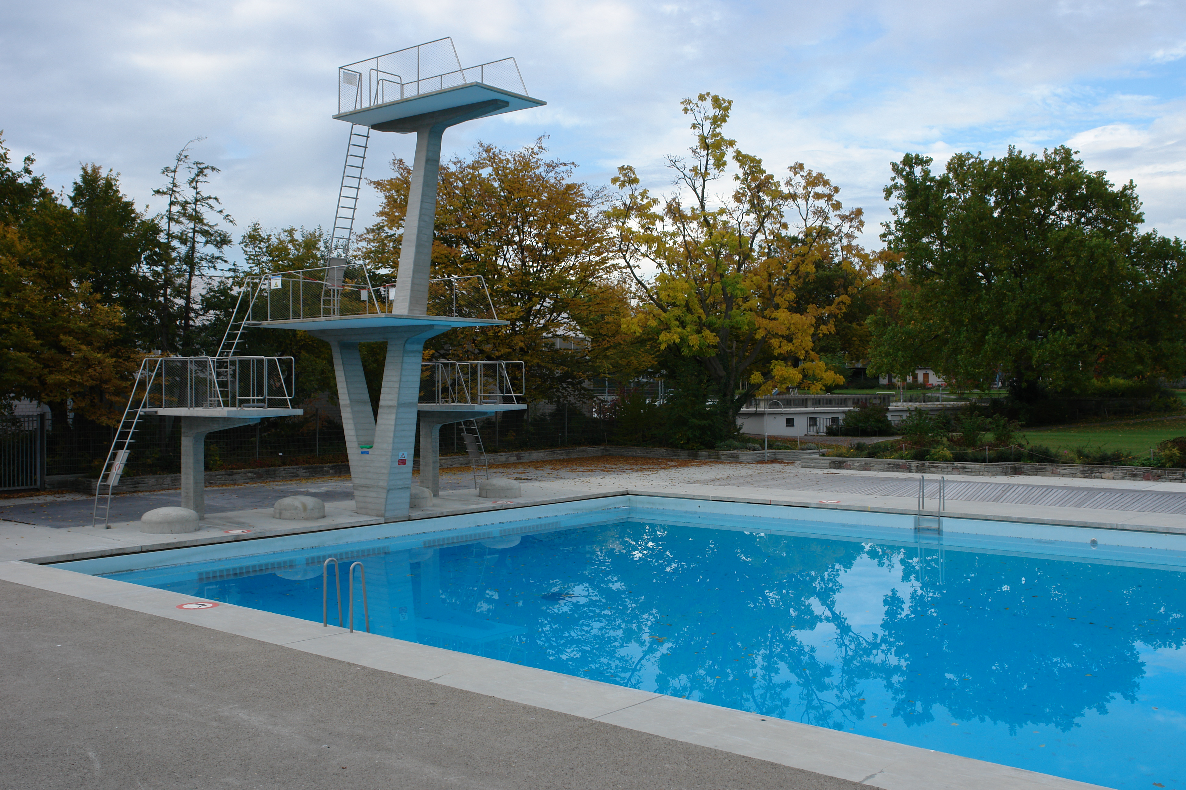 Freibad Letzigraben, Sprungturm, Wettbewerb 1943, errichtet 1947, Architekt: Max Frisch